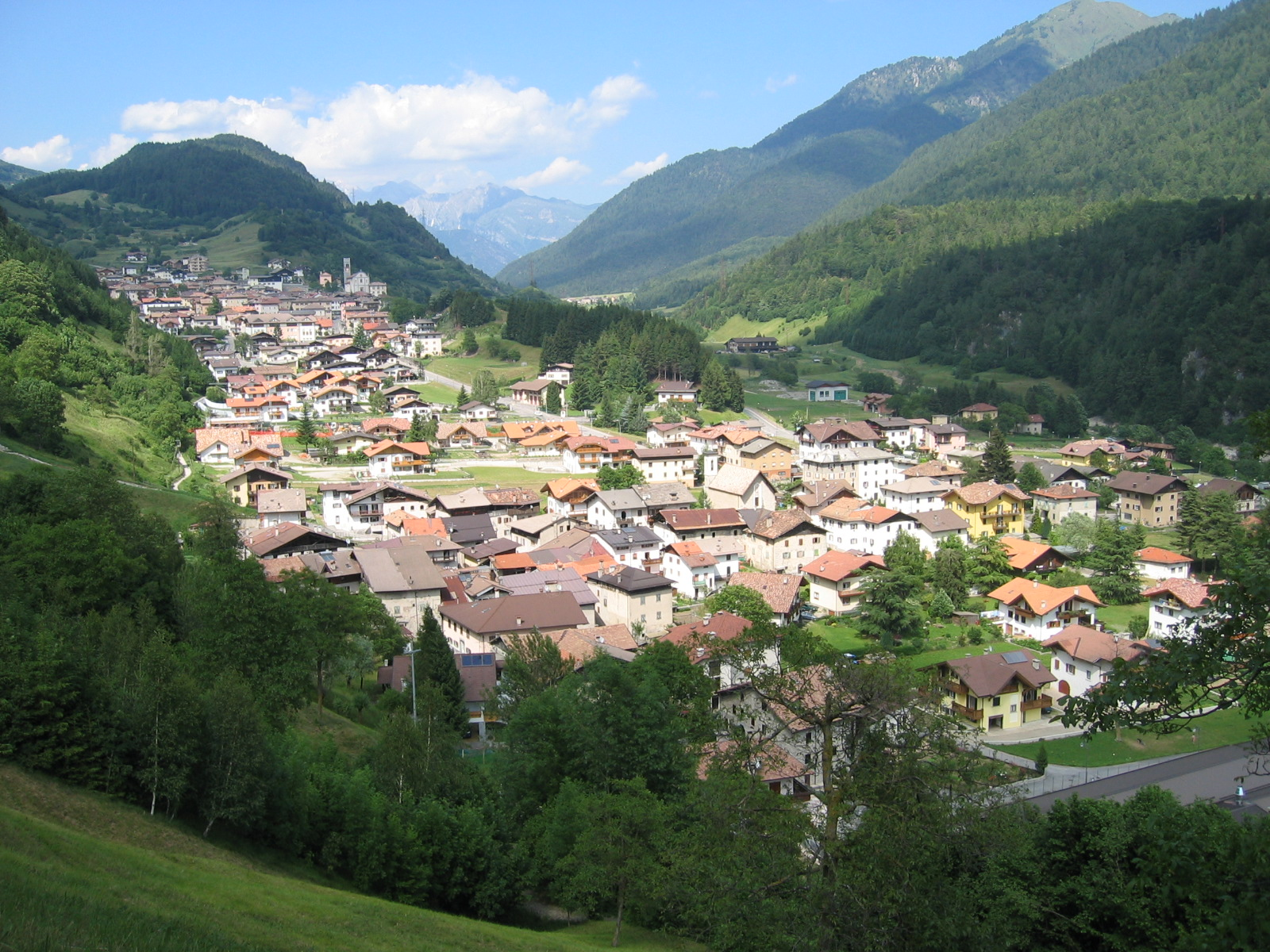 Fotografia del paese di Roncone e della frazione di Fontanedo (Trento) La fotografia è stata scattata da Michele Pedrolli (Utente:mix) ed è liberamente utilizzabile secondo la GFDL.